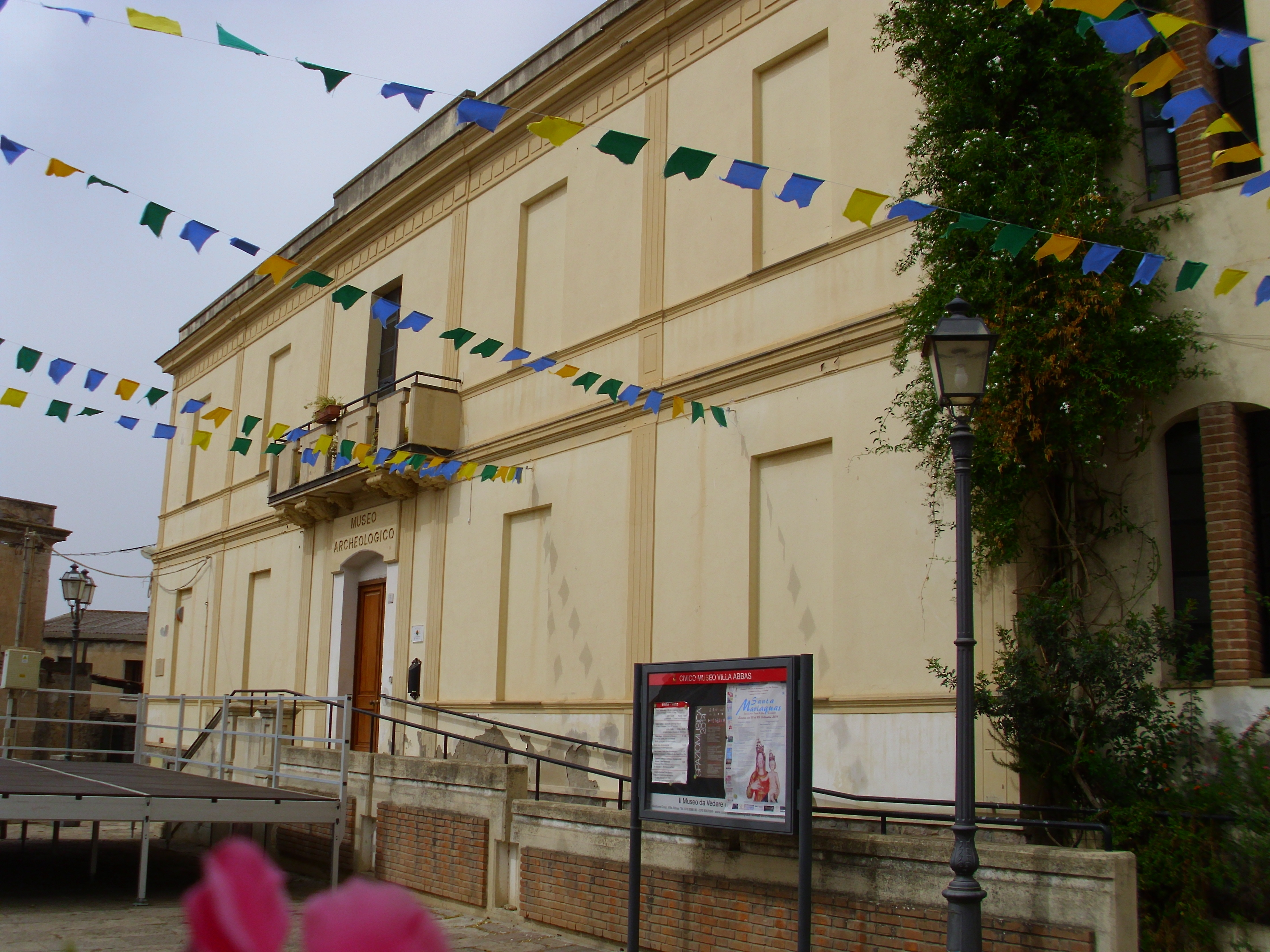 Museo archeologico "Villa Abbas" - MIBAC This is a photo of a monument which is part of cultural heritage of Italy.